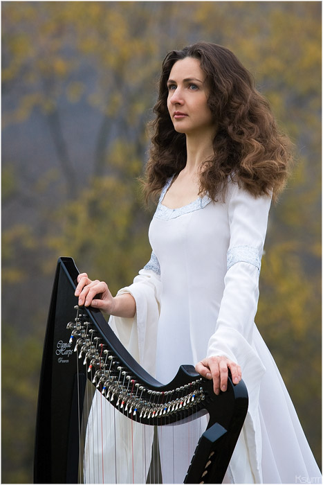 Анастасия Паписова